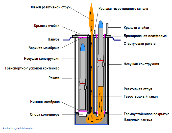 Пуск ракеты из УВП Mk41. Рисунок.